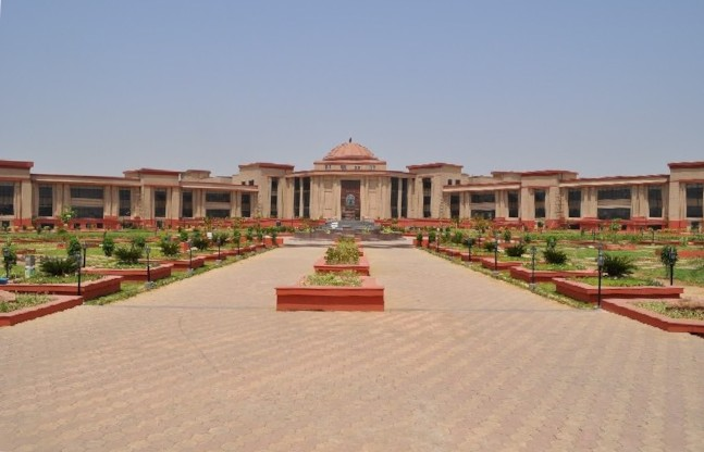 छत्तीसगढ़ उच्च न्यायालय बिलासपुर Chhattisgarh high court, India